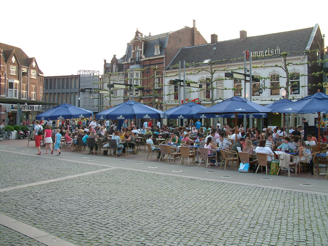 Heuvel in centrum Tilburg 11 mei 2006 Foto 13